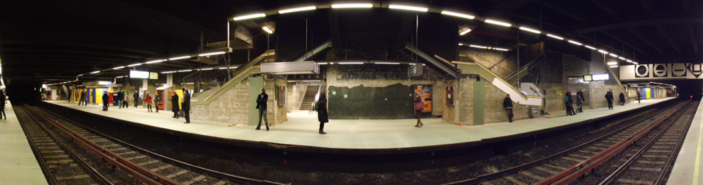 Arts-Loi (métro de Bruxelles)